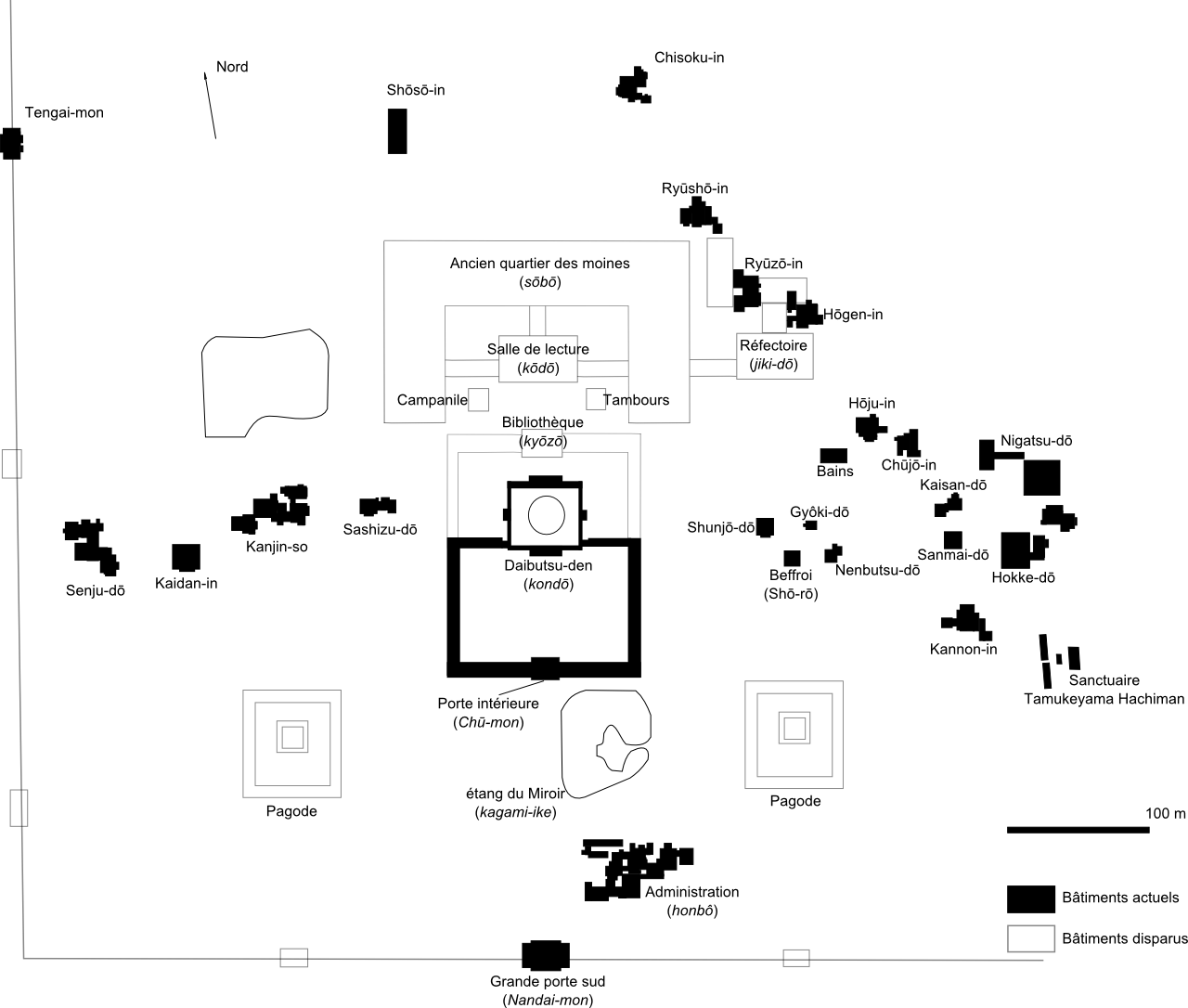 Plan général du Todaiji. Source : Yutaka Mino, John M. Rosenfield, William H. Coaldrake, Samuel C. Morse et Christine M. E. Guth, The Great Eastern Temple: treasures of Japanese Buddhist art from Tōdai-ji, The Art Institute of Chicago et Indiana University Press, 1986, 180 p. (ISBN 9780253203908) Dominique Buisson, Temples et sanctuaires au Japon, Éditions du Moniteur, 1981, 239 p. (ISBN 978-2862821382) Takeshi Kobayashi, Nara Buddhist Art: Tōdai-ji, vol. 5, Weatherhill, coll. « Heibonsha Survey of Japanese Art », 1975, 160 p. (ISBN 978-0834810211)